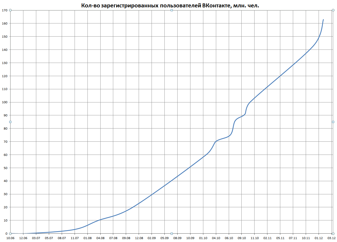 График, показывающий рост количества зарегистрированных пользователей ВКонтакте (млн. чел.)